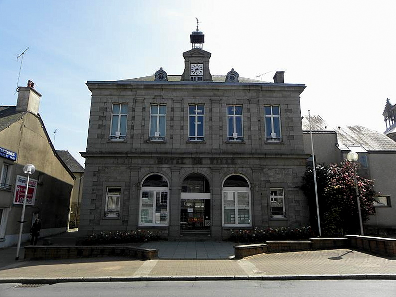 Mairie de Liffré (35).